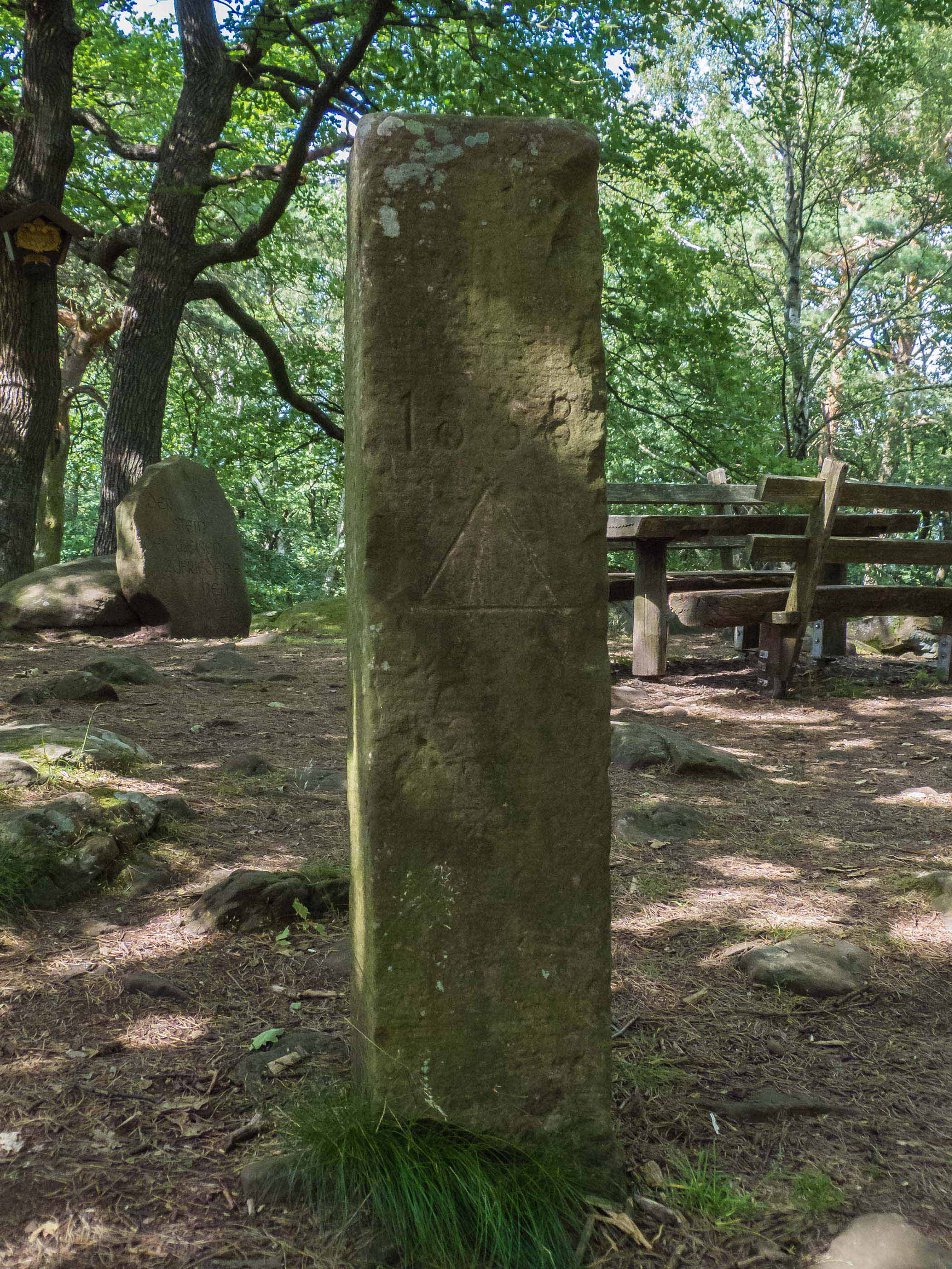 Niveaustein auf dem Nollenkopf